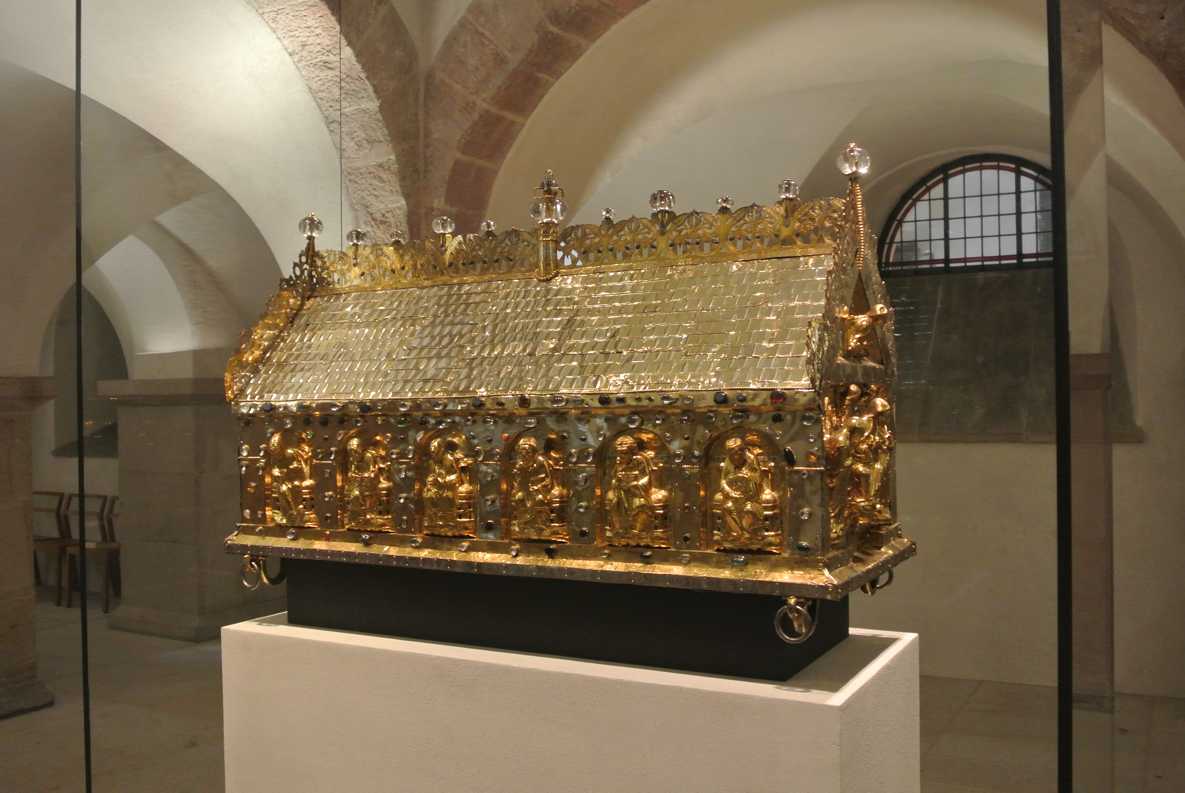 希尔德斯海姆主教座堂地下室